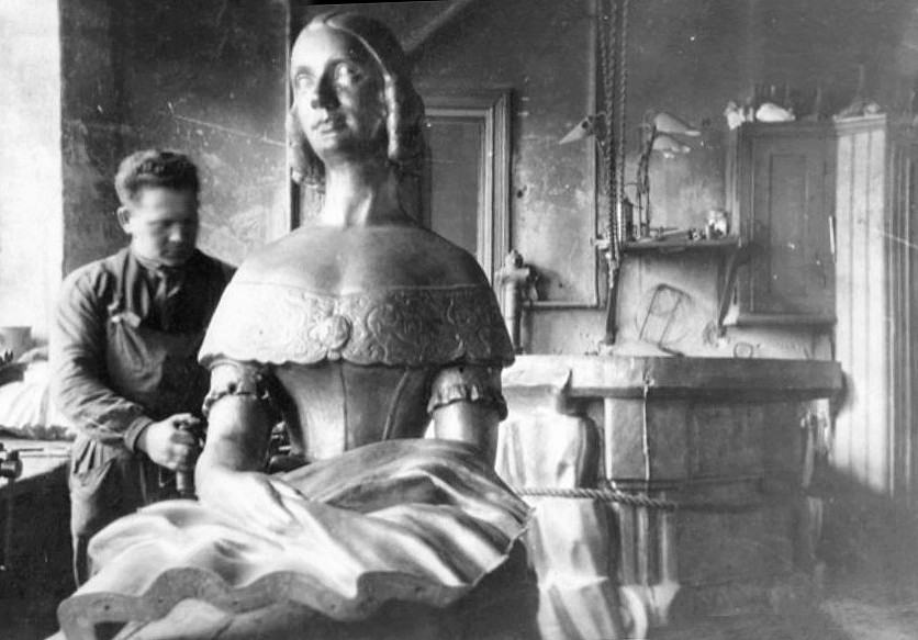 Statyn av operasångerskan Jenny Lind under gjutningen, finns på Djurgården, formgiven av Erik Rafael-Rådberg